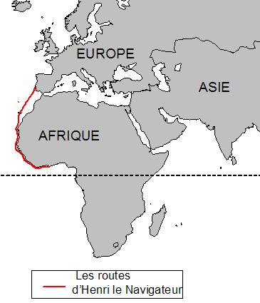 Les routes d'Henri le Navigateur Auteur G. Dulous Mars 2007